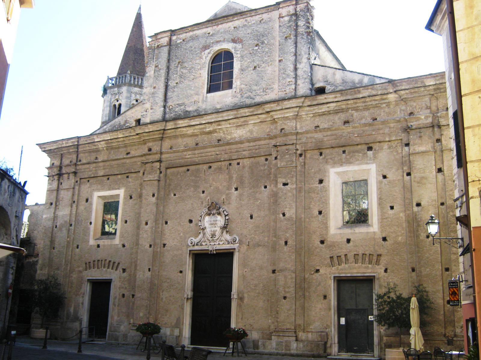 Finalborgo, Basiliek van de Geboorte